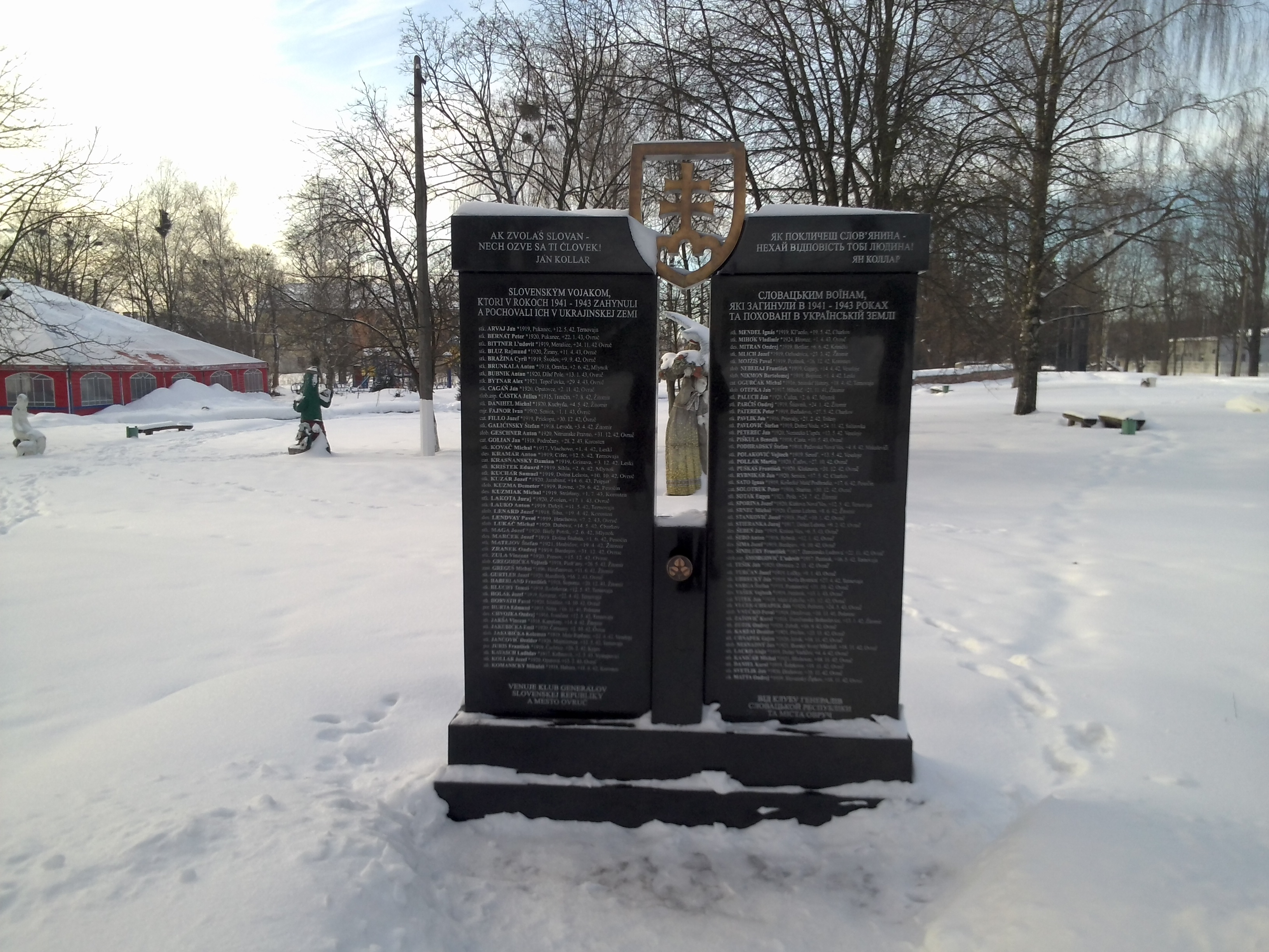 м. Овруч. Пам'ятник словацьким воякам